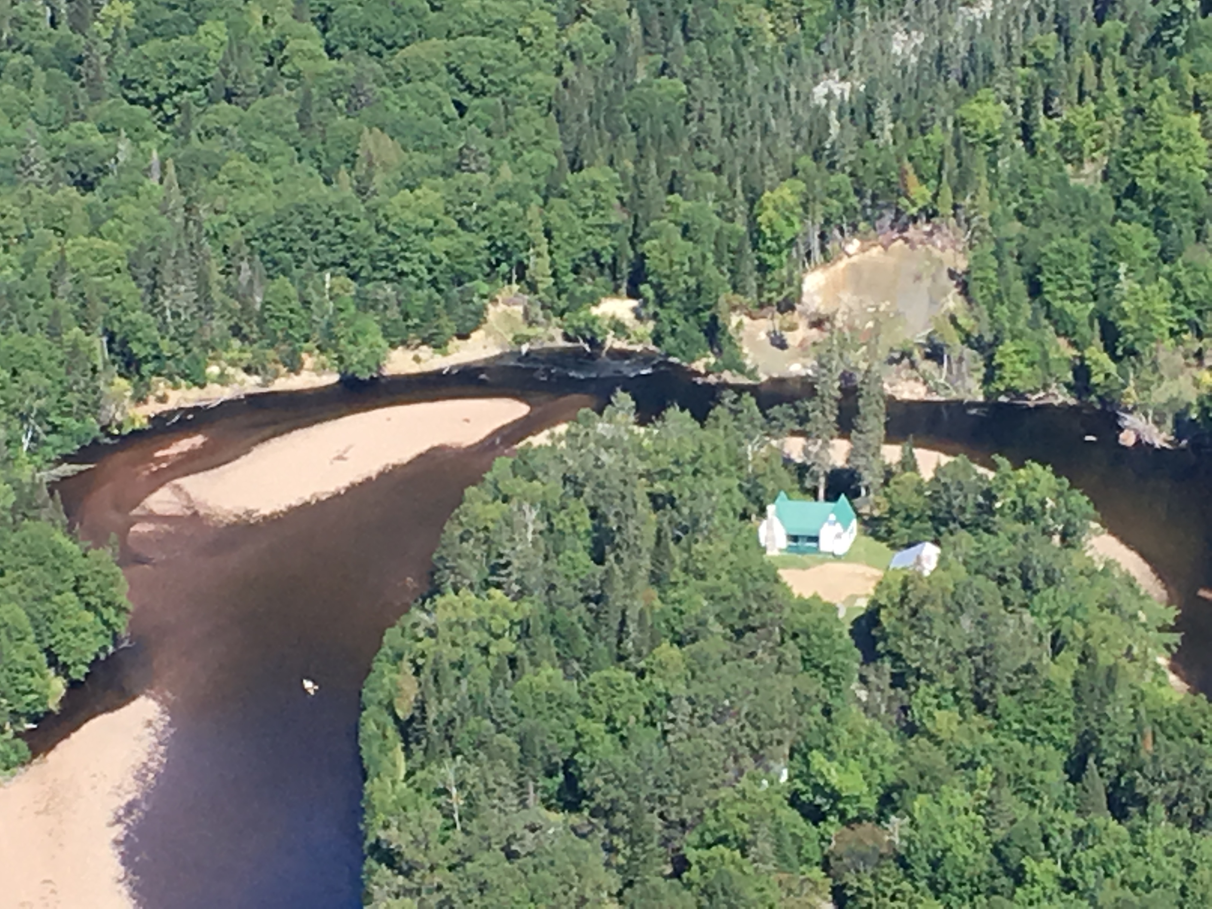 Rivière Sainte-Marguerite, Saguenay, Québec, Canada.